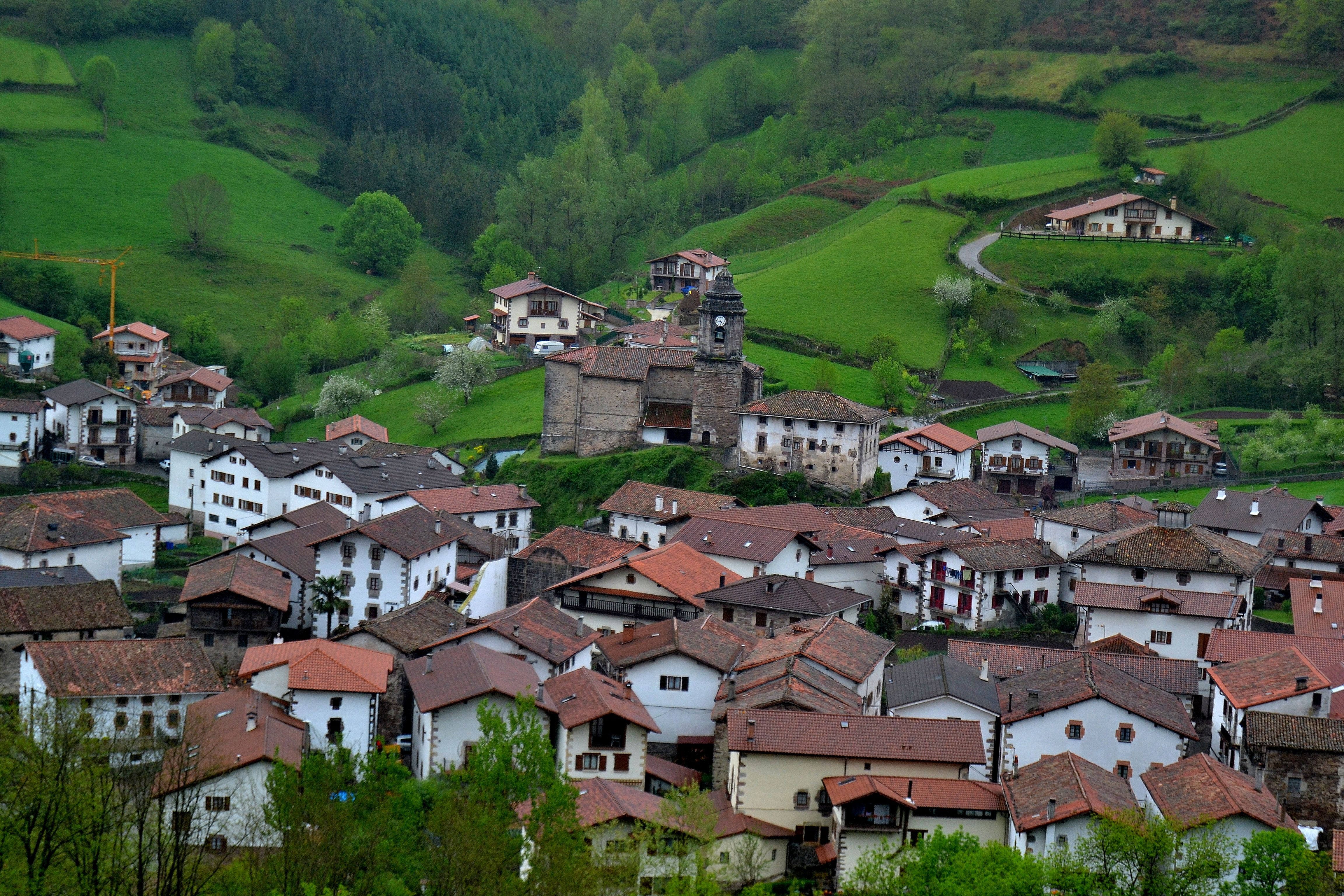 Zubieta. Malerreka, Nafarroa. Euskal Herria. Zubieta. Malerreka, Navarre. Basque Country.